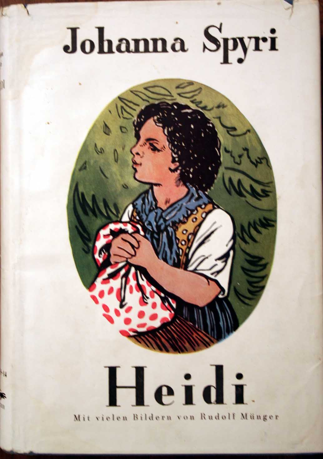 Heidi Titelbild